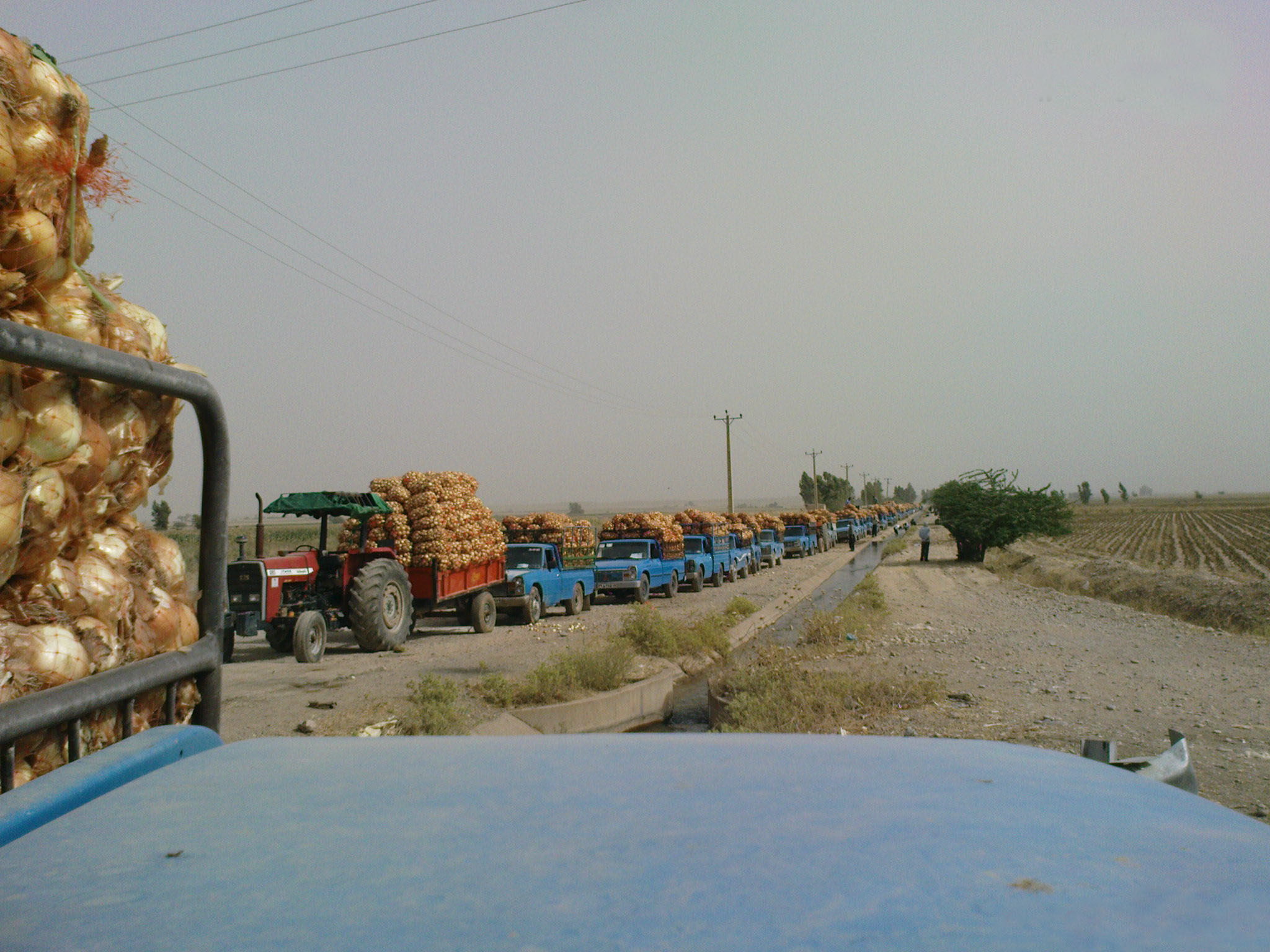 پیاز در شلگهی دزفول